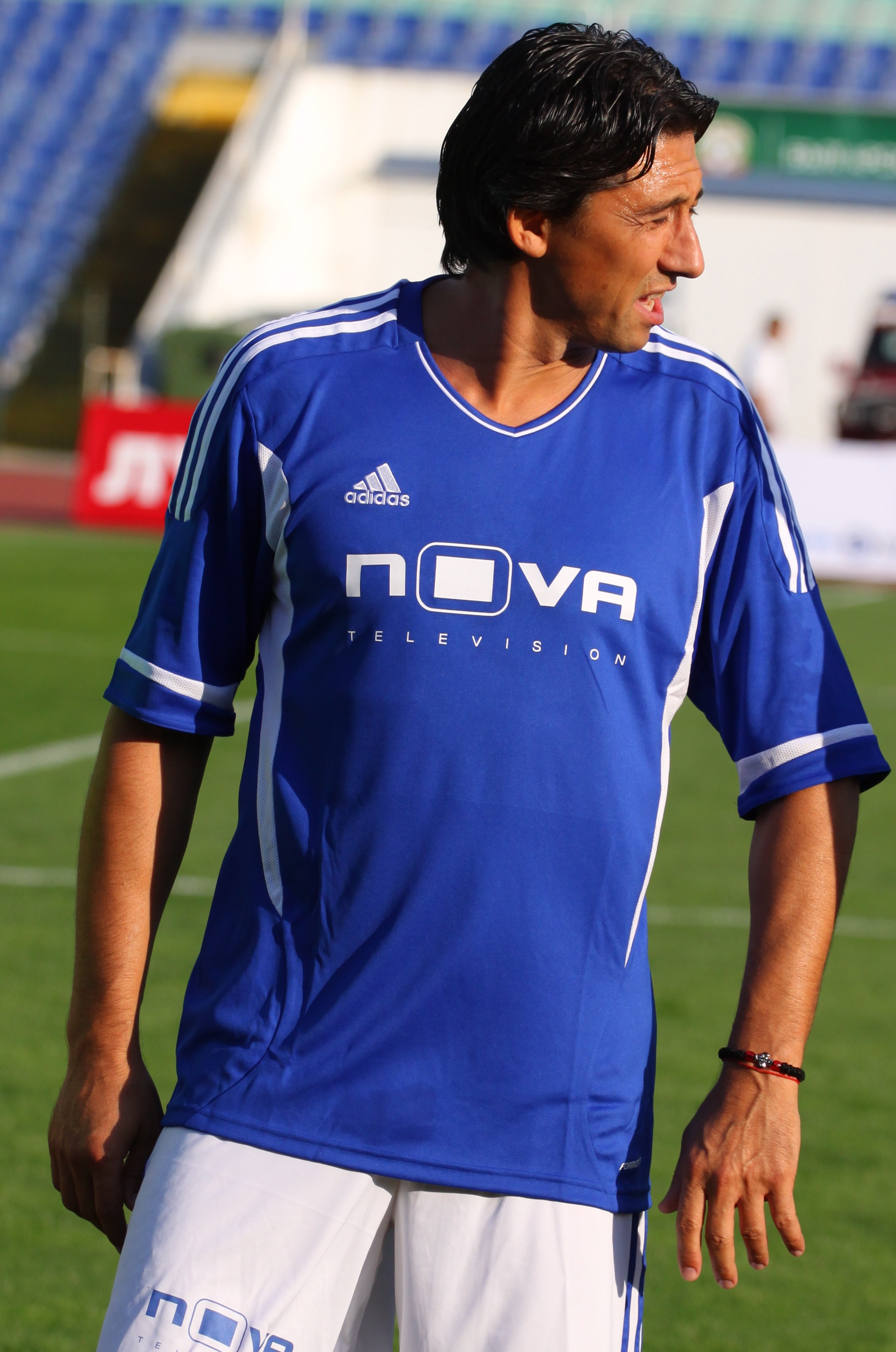 Даниел Боримиров - бивш български футболист, национал.